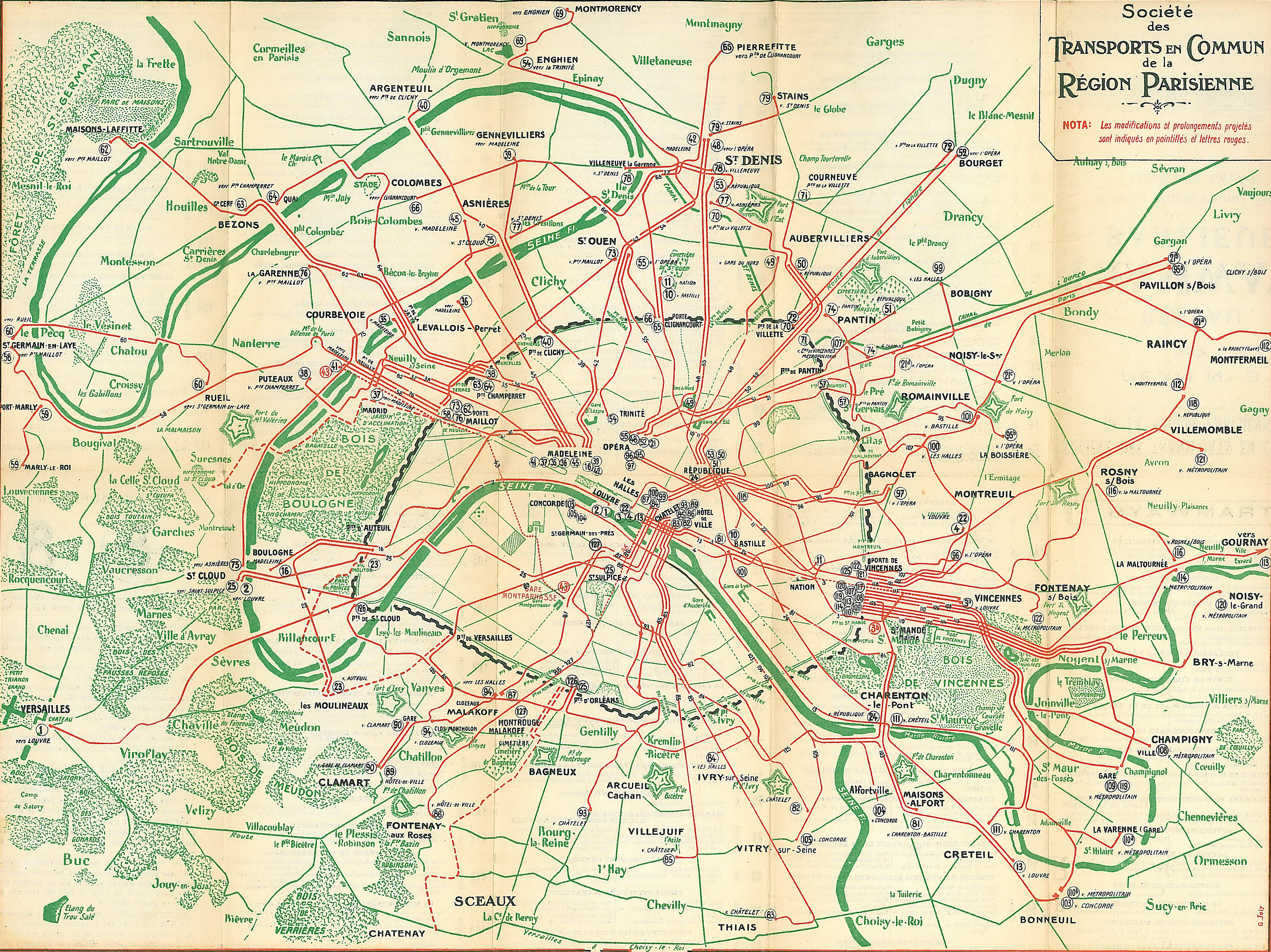 Société des transports en commun de la région parisienne (STCRP) : Plan n°3 : réseau tramways banlieue